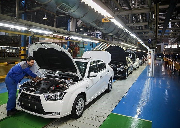 مراسم آغاز تولید دنا پلاس توربو و پژو ۲۰۷ i صندوقدار اتوماتیک محصولات جدید شرکت ایران خودرو